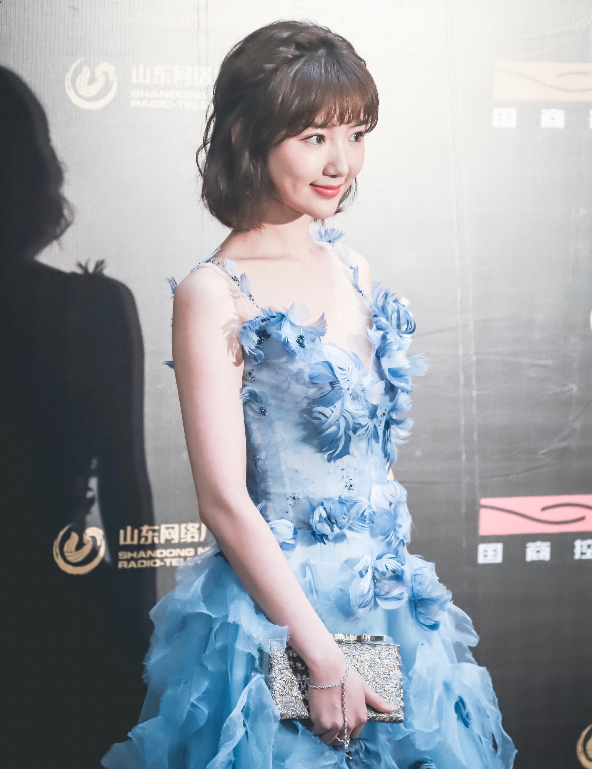 小资红毯 毛晓彤